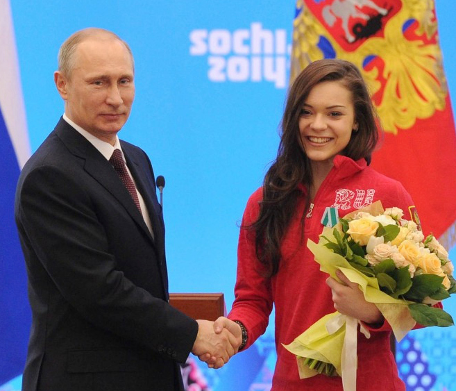 Орденом Дружбы награждена олимпийская чемпионка в фигурном катании Аделина Сотникова.